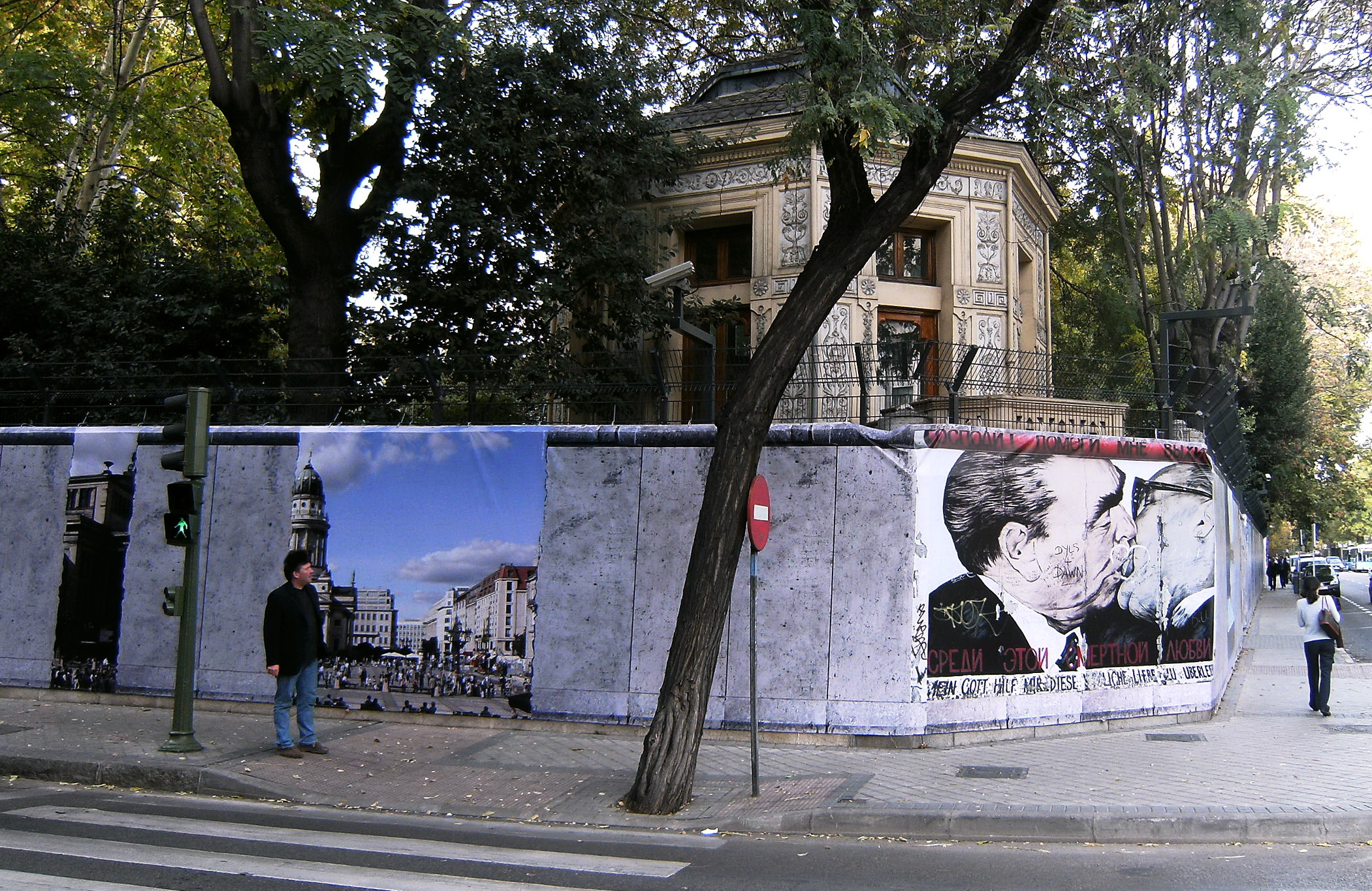 Deutsche Botschaft in Madrid. Nachbildung der Berliner Mauer auf LKW Plane.